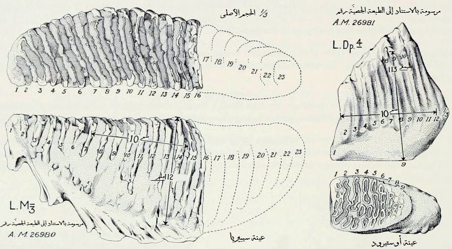 ضرسان شكَّلا العيِّنة النمطيَّة من الماموث الصُوفي وفقًا لِلعالم الأمريكي هنري فارفيلد أوزبورن، الذي رسمهما استنادًا إلى طبعتان جصيَّتان من المتحف الأمريكي.